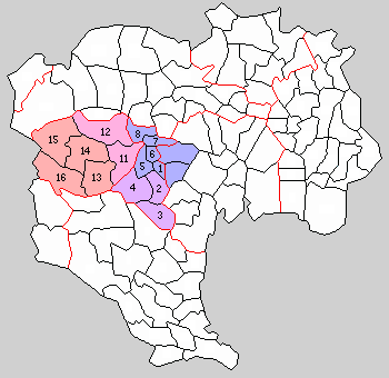 豊多摩郡の町村